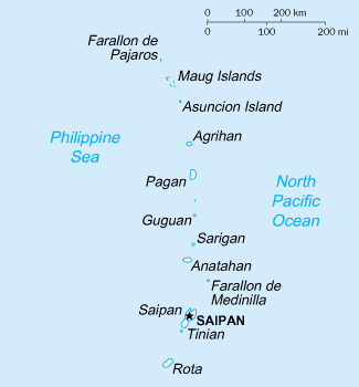 Karte der Nördlichen Marianen